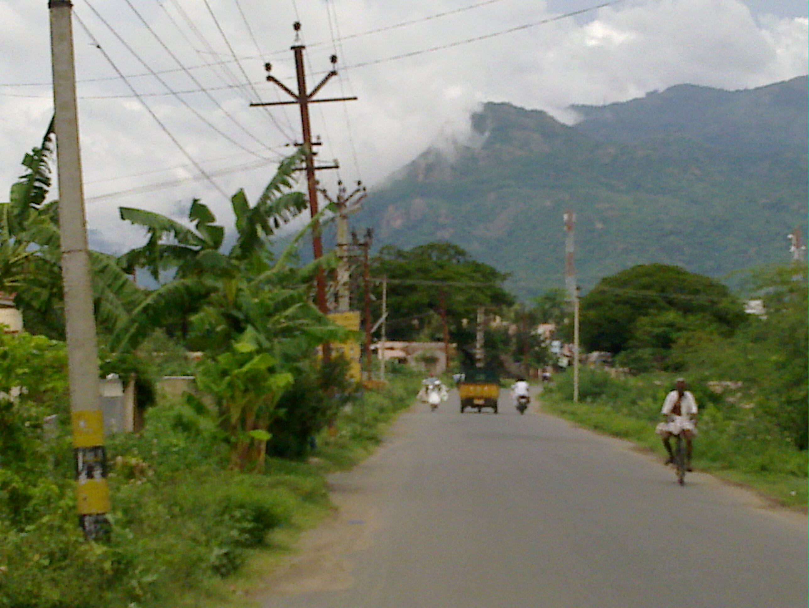 ஏற்காடு மலை- அடிவாரம்